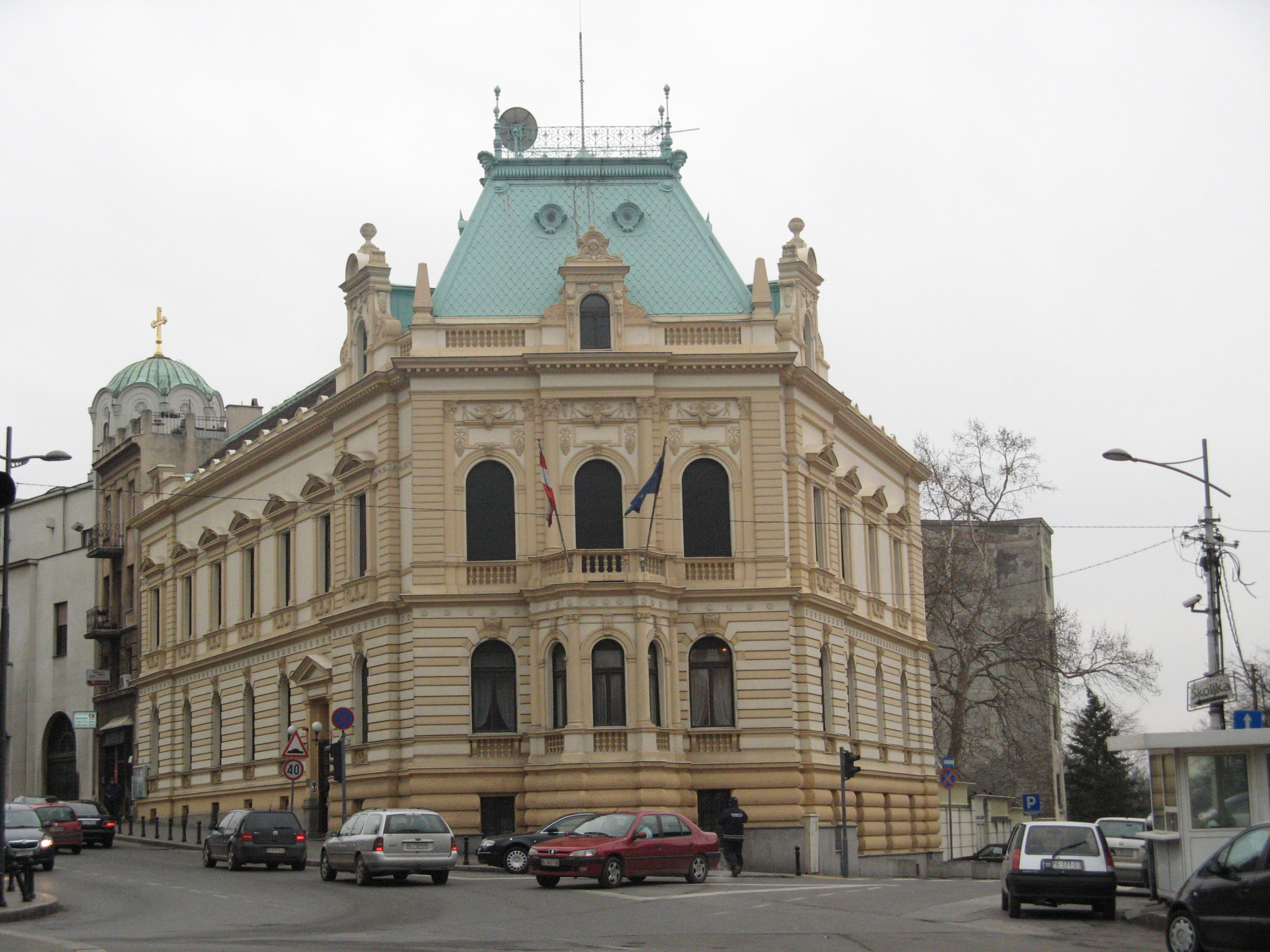 Кућа Димитрија Крсмановића